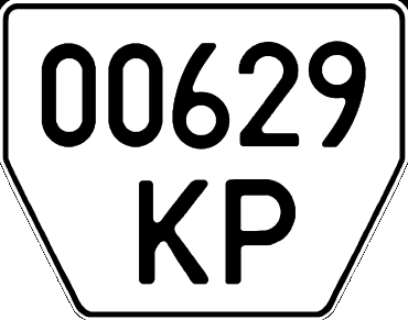 Номер прицепов Украины, 1995-2004 годы